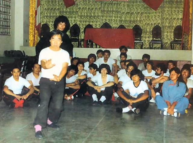 Sifu Fausto Wong demonstrerar med Sifu Adolfo Tijero i bakgrunden.